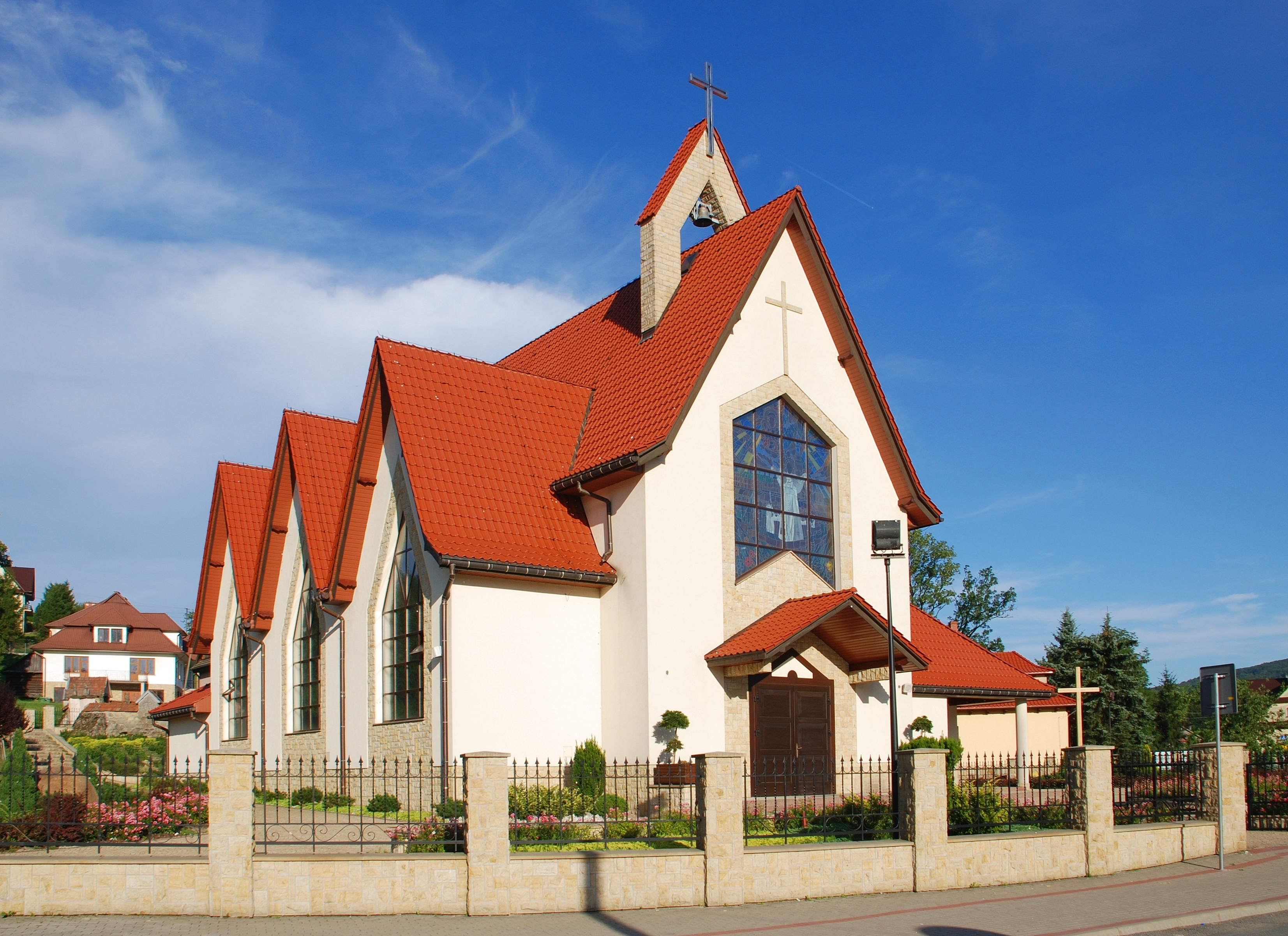 wieś Rajbrot